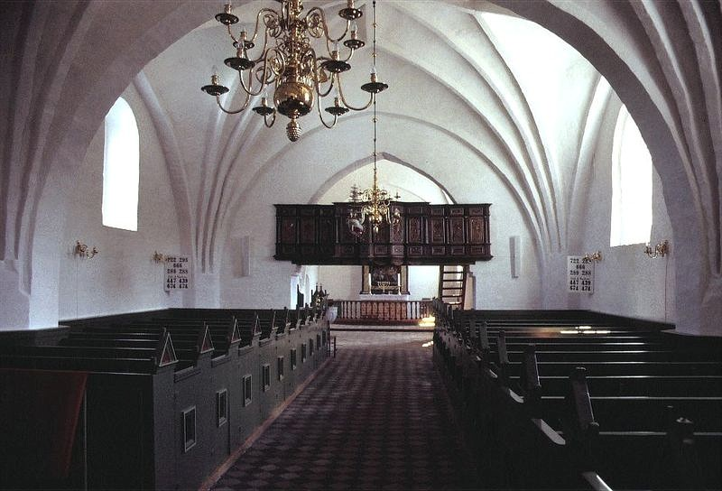 Tise Kirke i Danmark. Skibet set mod øst